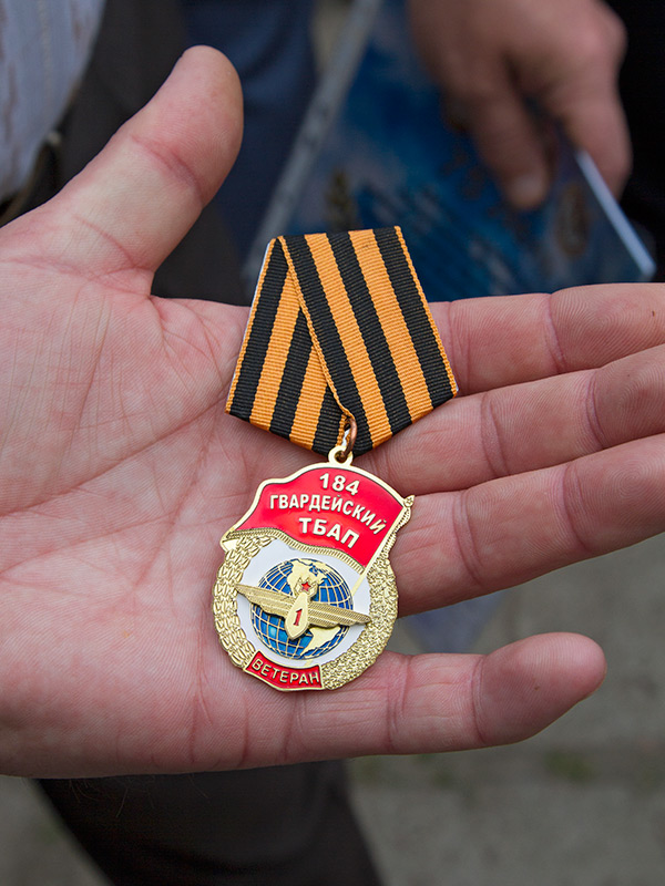 Медаль «184 гвардейський ТБАП. Ветеран»: Пам’ятна громадська медаль «184 гвардейський ТБАП. Ветеран», яка вручалася ветеранам полку на відзначення 75-ї річниці полку.